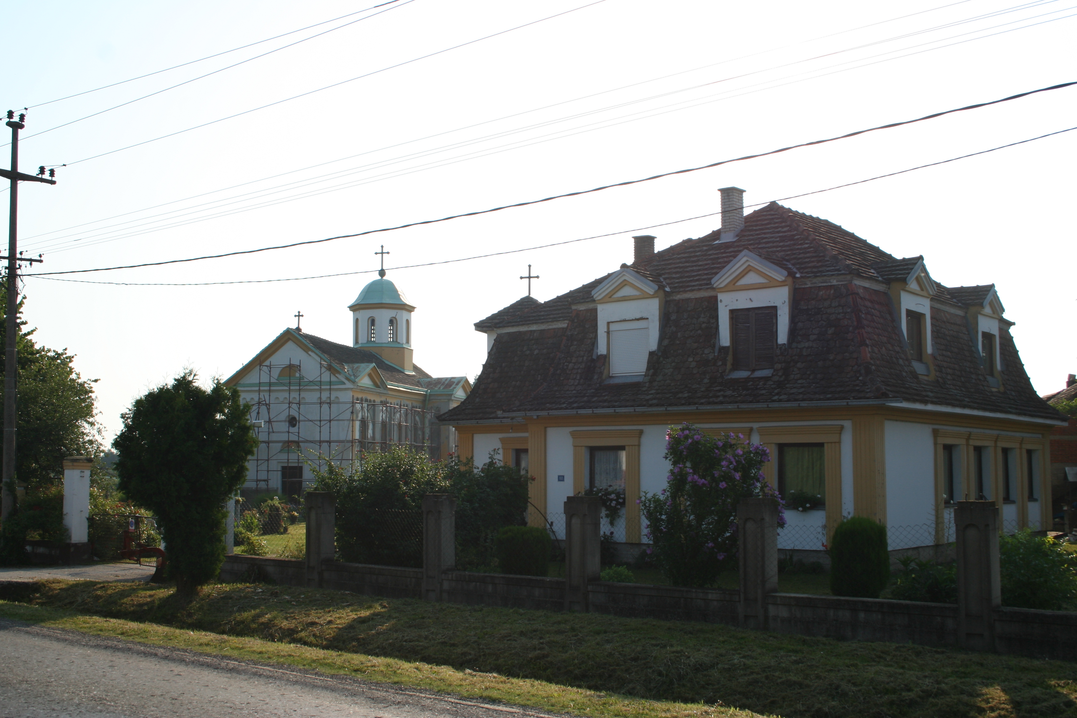 Crkva Svetog Marka, Varna